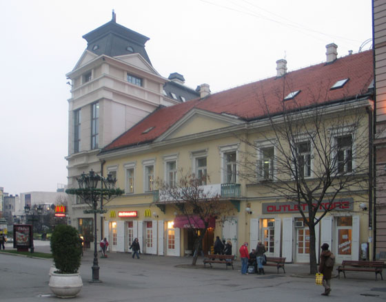 Опис: Пословни центар "Аполо" у Новом Саду. Аутор: Ненад Шегуљев